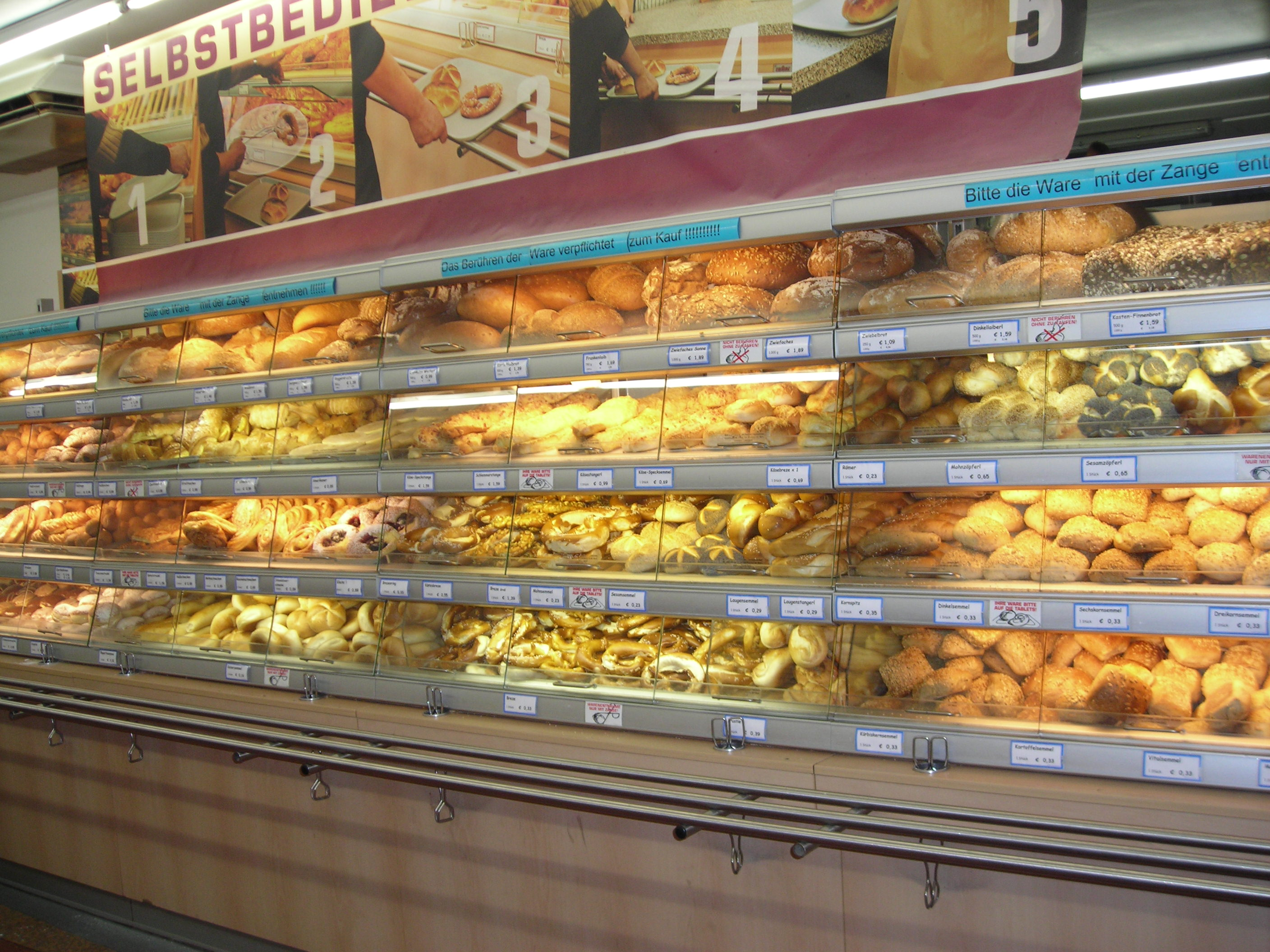 Selbstbedienungsschrank in einem Backwaren-Ladengeschäft in München.